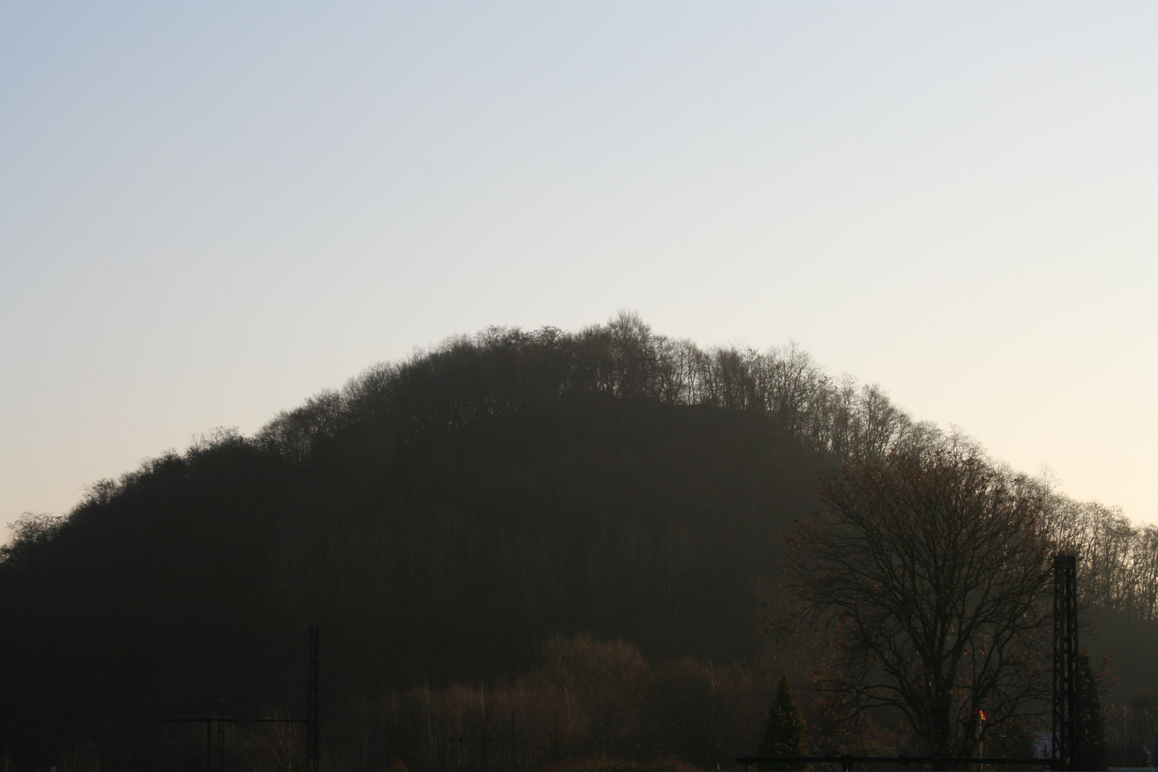 Knappenhalde Oberhausen